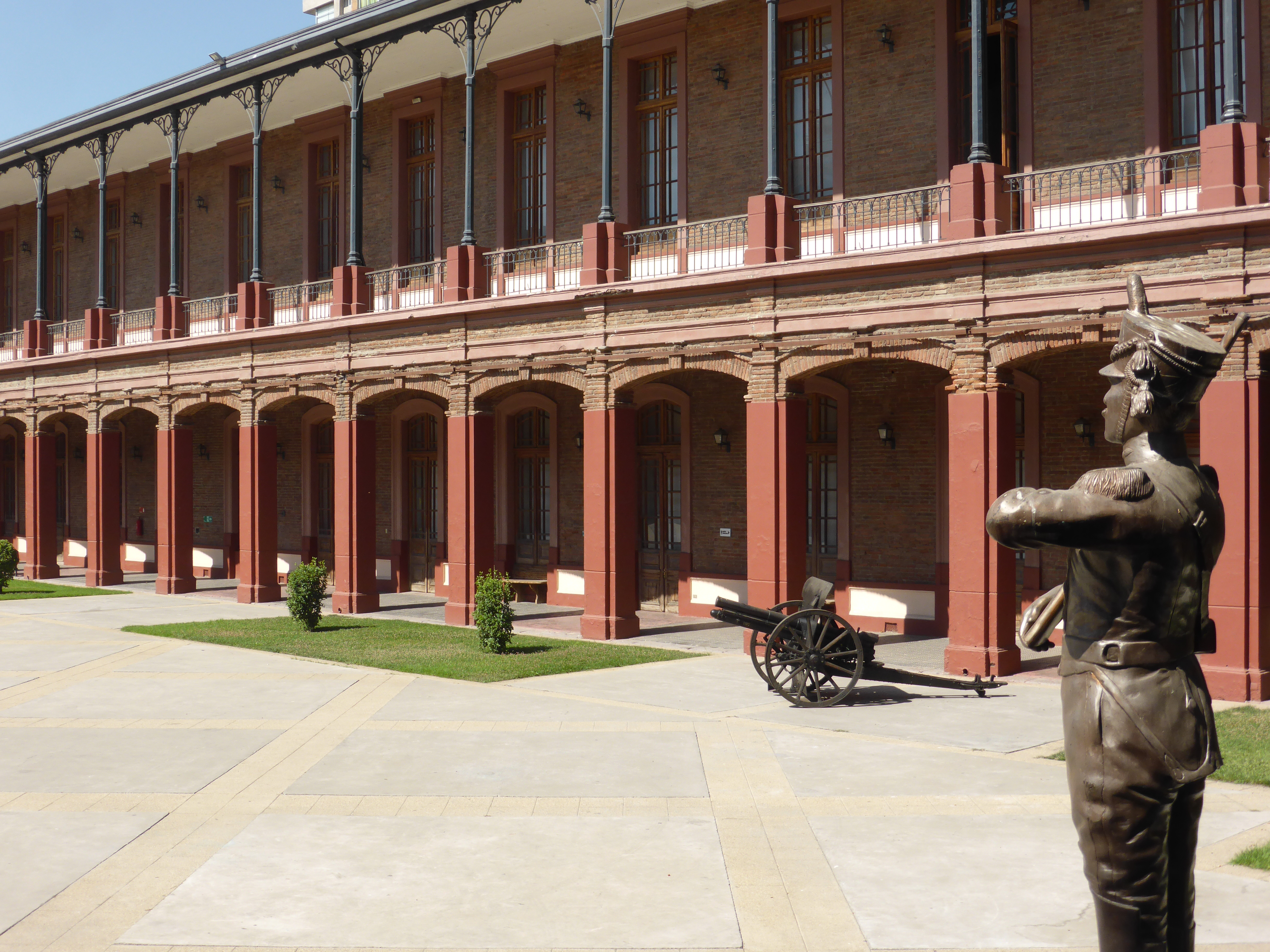 Vista parcial del gran patio central, con galerías. Antigua Escuela Militar, del año 1901.